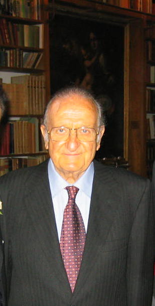 AURELIO ROMEO